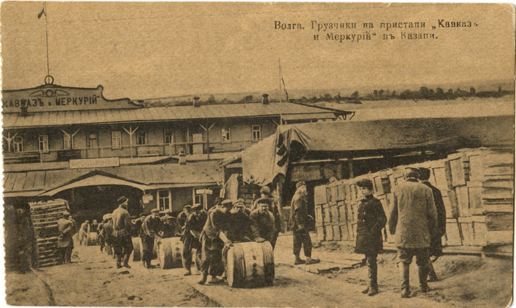 Волга. Грузчики на пристани "Кавказ и Меркурий" в Казани. Открытка.